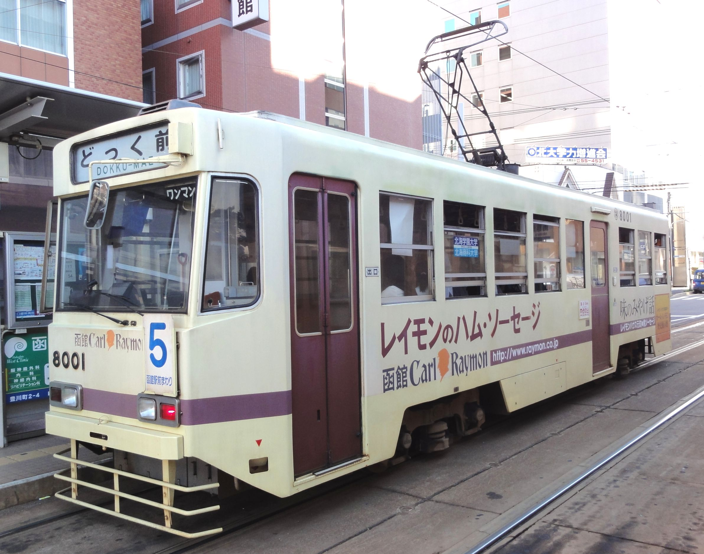 函館市交通局8000形電車